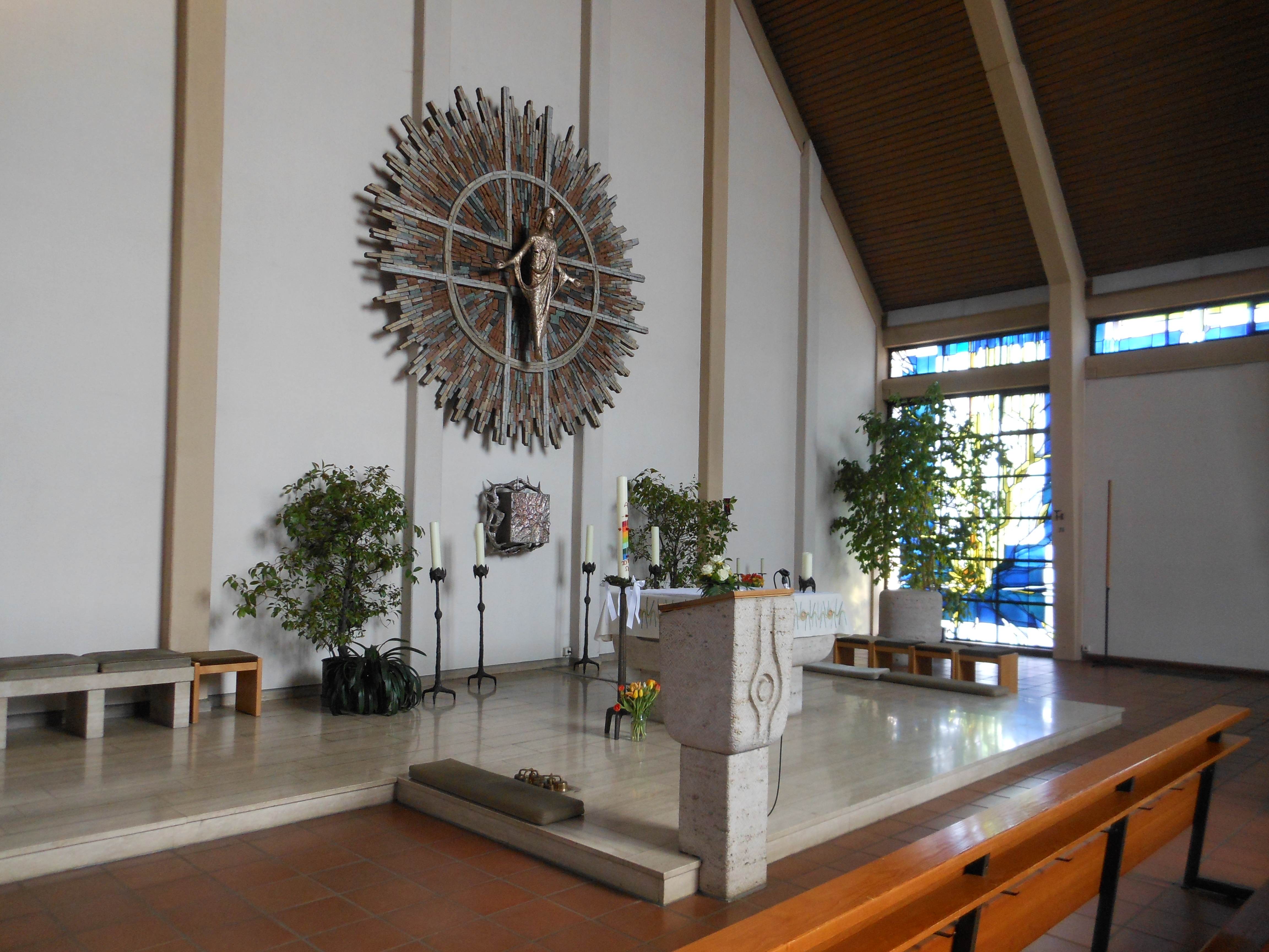 Rodenberg, kath. Kirche Mariä Himmelfahrt